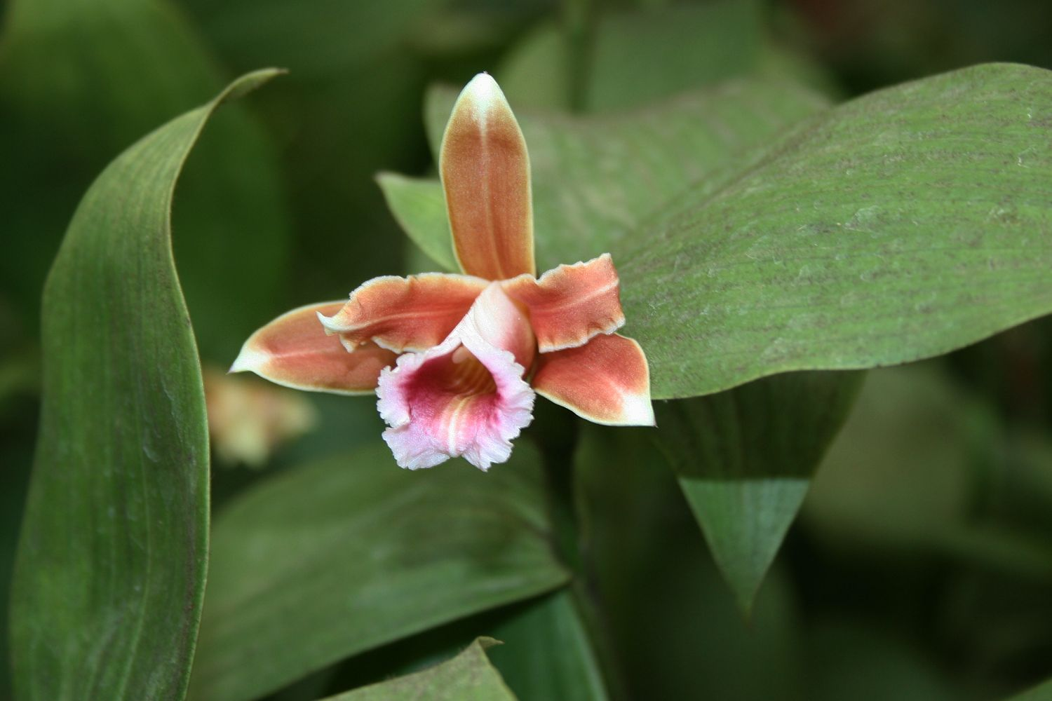 Sobralia atropubescens, Orchideen (Orchidaceae), coll. Bogarín 2526 - Costa Rica: Prov. Cartago, Paraíso, Jardín Botánico Lankester/Lankester Botanical Garden, Orchid greenhouse